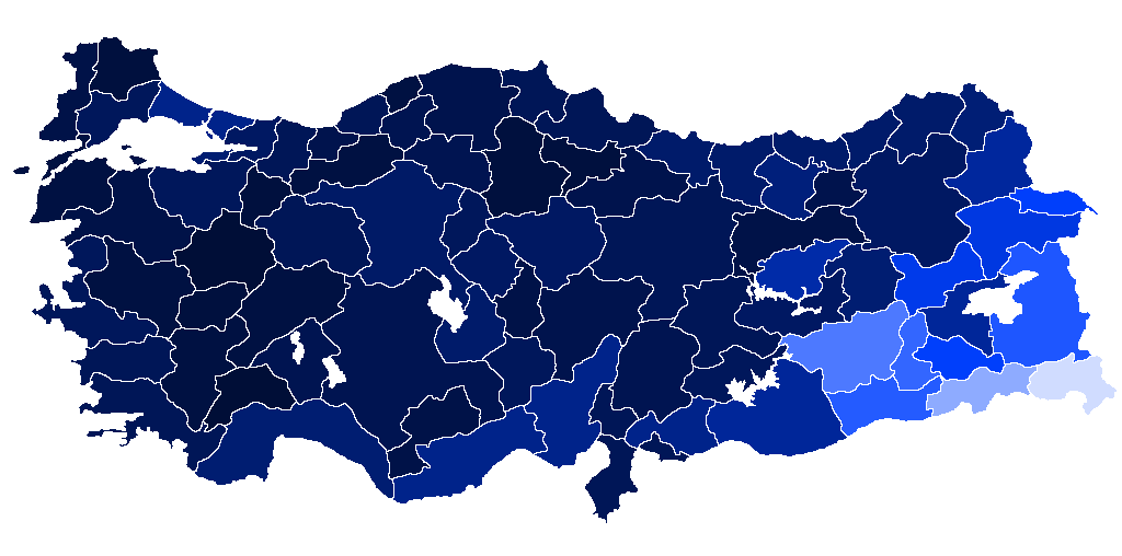 12 Eylül 2010 referandumuna katılım oranı